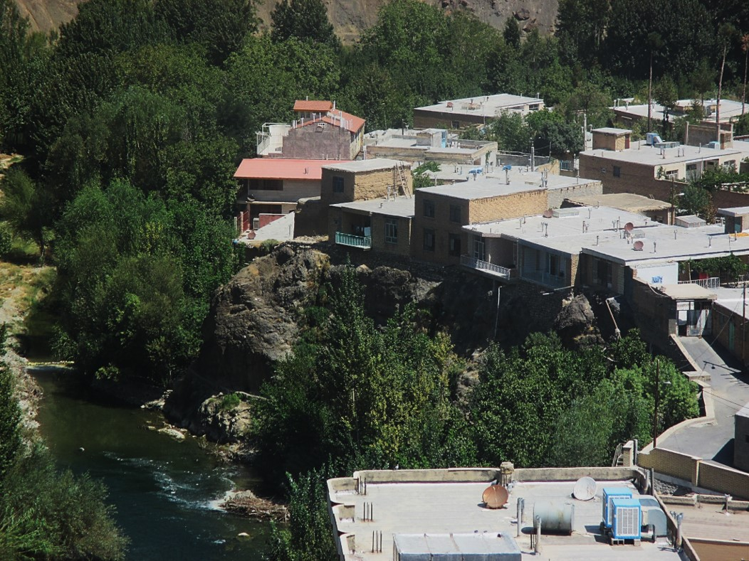 اصفهان-زاینده رود